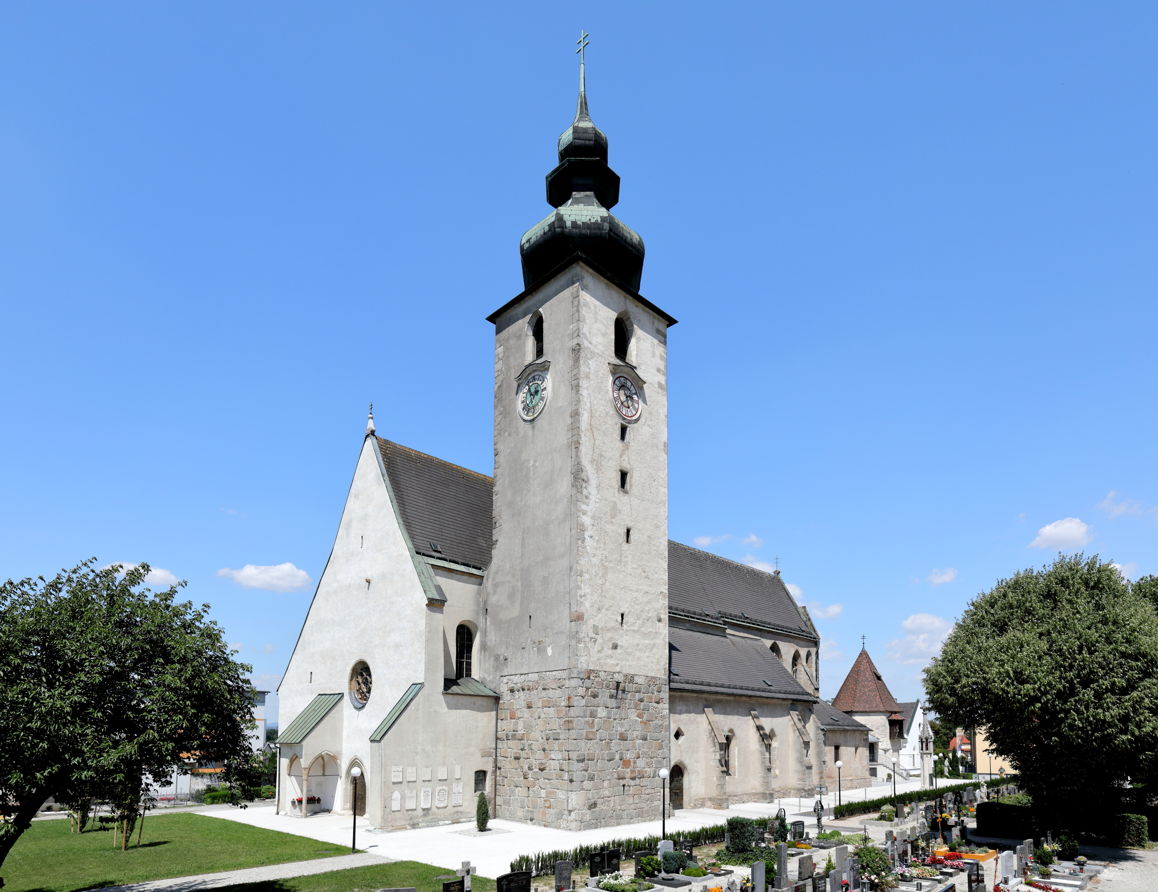 Südansicht der röm.-kath. Pfarrkirche und Basilika St. Laurenz in der oberösterreichischen Stadt Enns. Ursprünglich eine romanische Pfeilerbasilika, welche seit 1323 in gotische Um- und Erweiterungsbauten aufging.